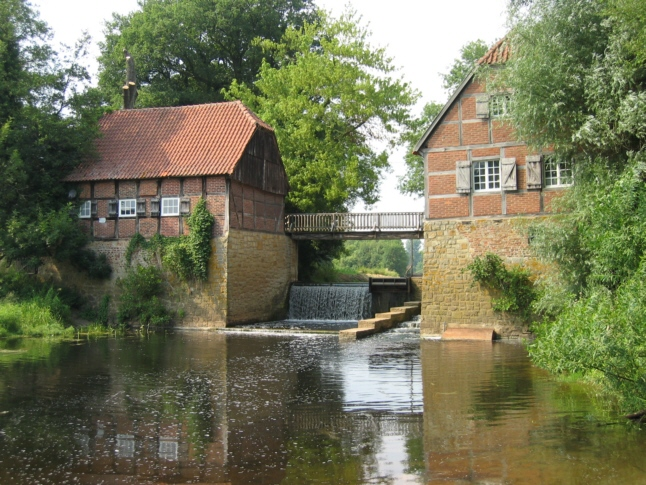 Die Bever bei Haus Langen. Fotografiert von Werner B. Sendker